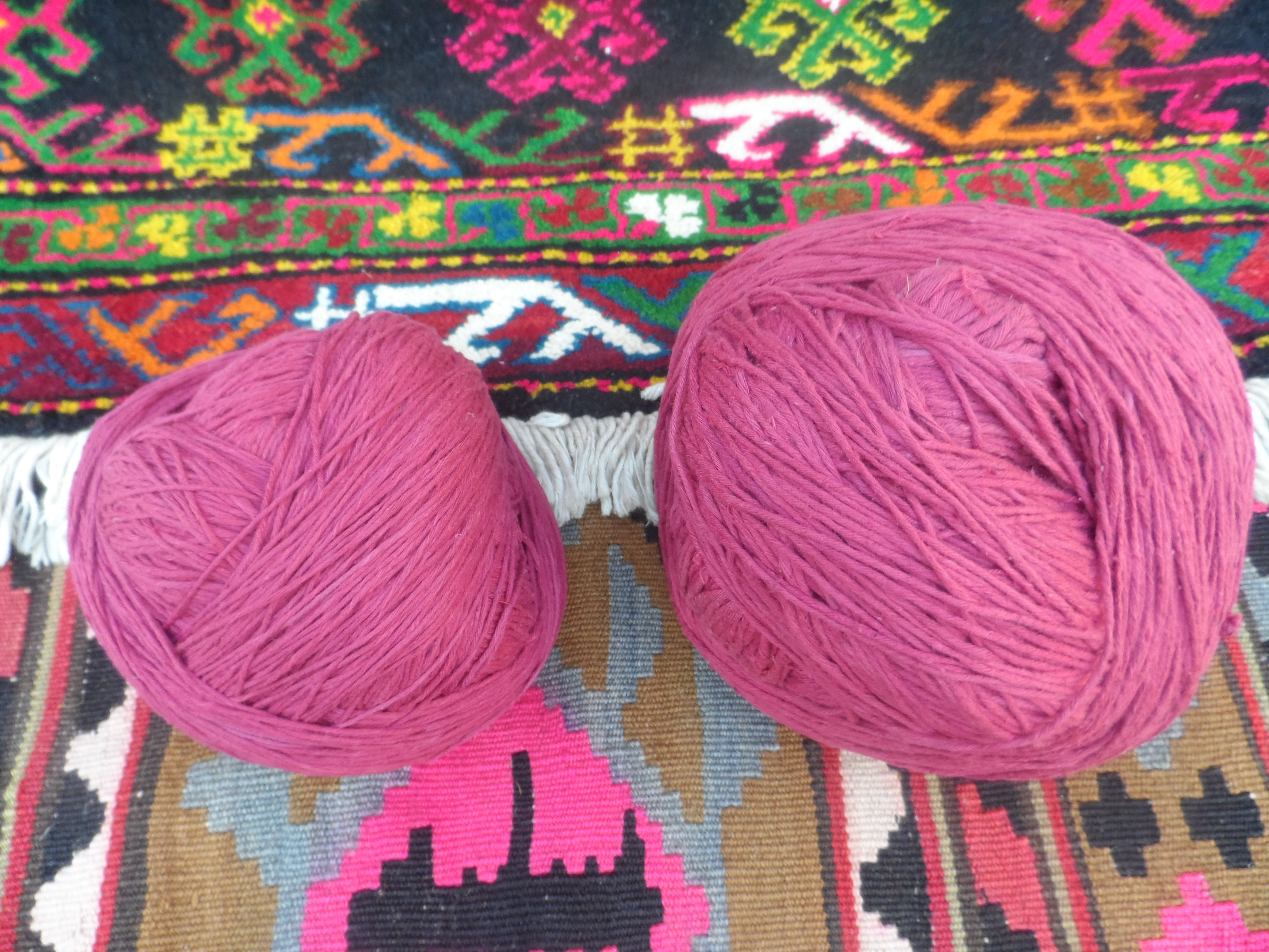 Yun arğac iplik.